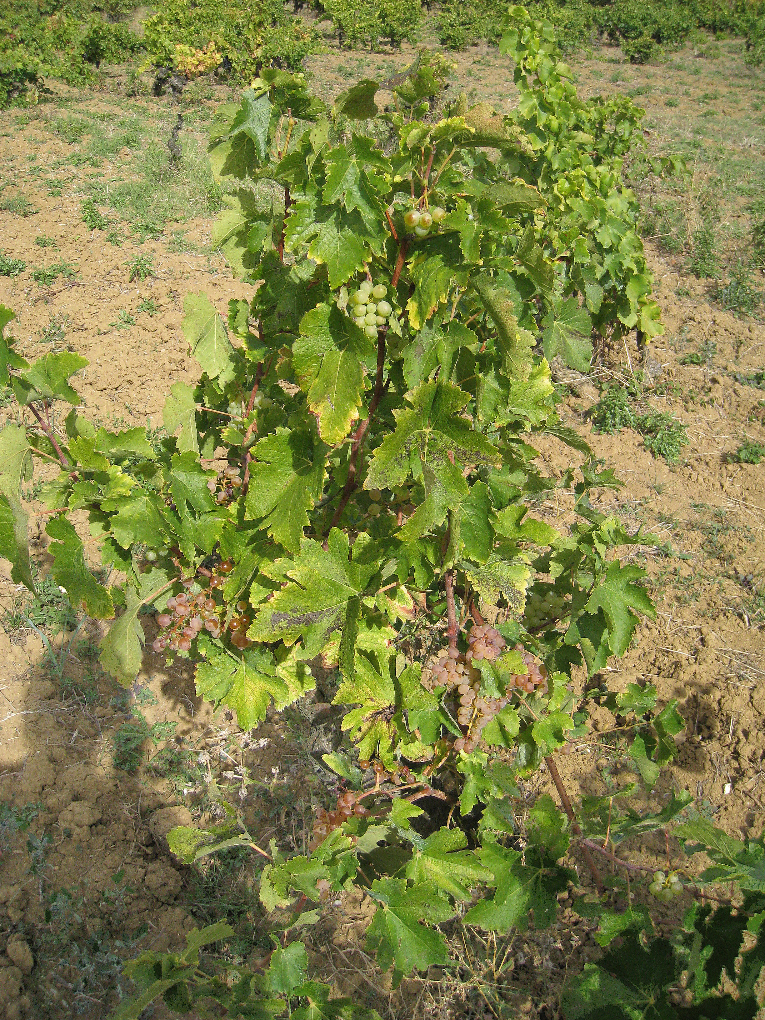 Cep de verdanel au domaine Plageoles